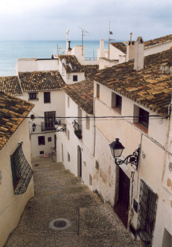 Eigen foto Fruggo (vrijgegeven onder GNU), maart 2004. Straatje in Altea (Spanje).